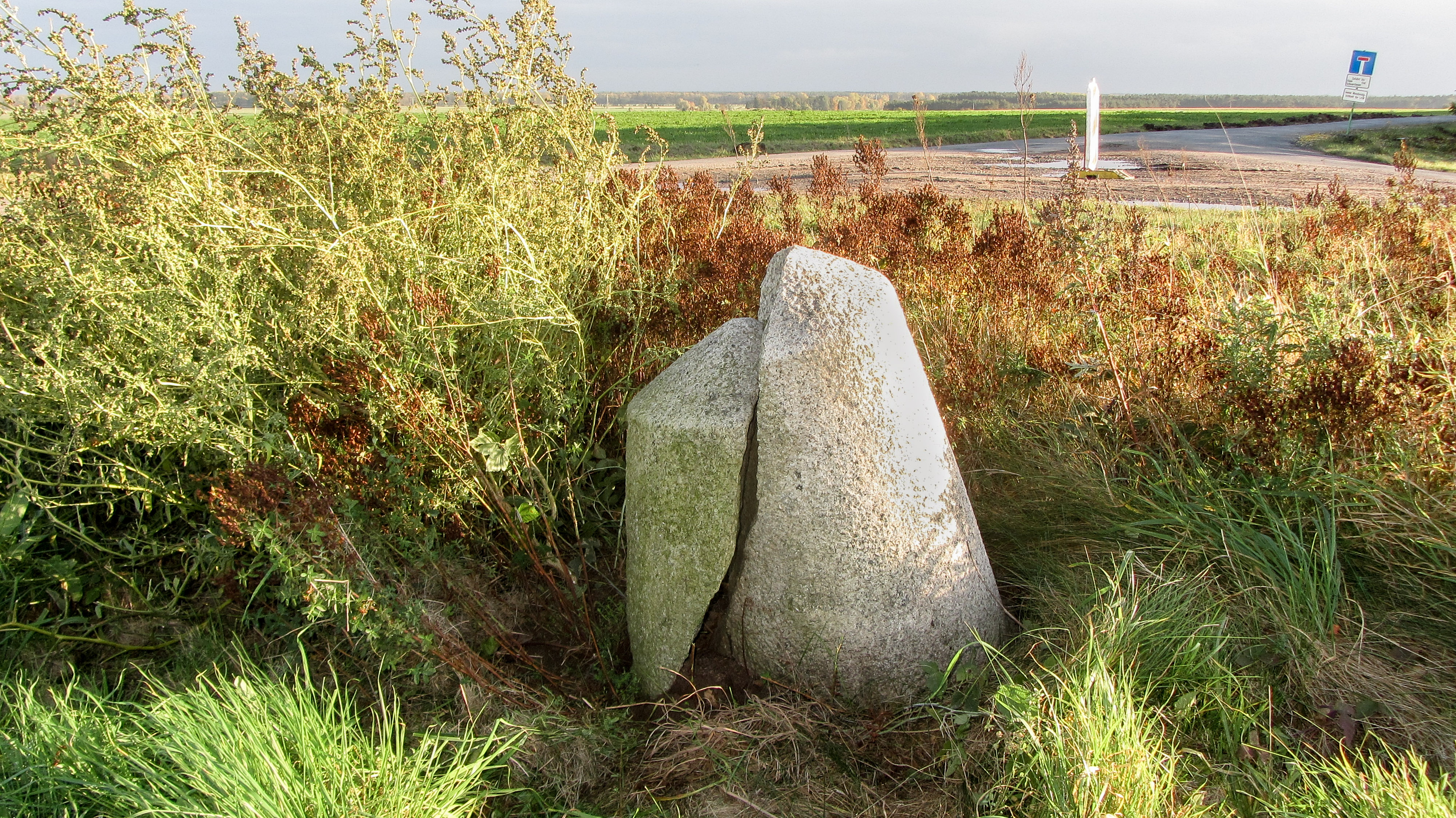 Preußischer Rundsockelstein (beschädigt) bei Hüselitz an der L 30, Abzweig K 1191 nach Klein